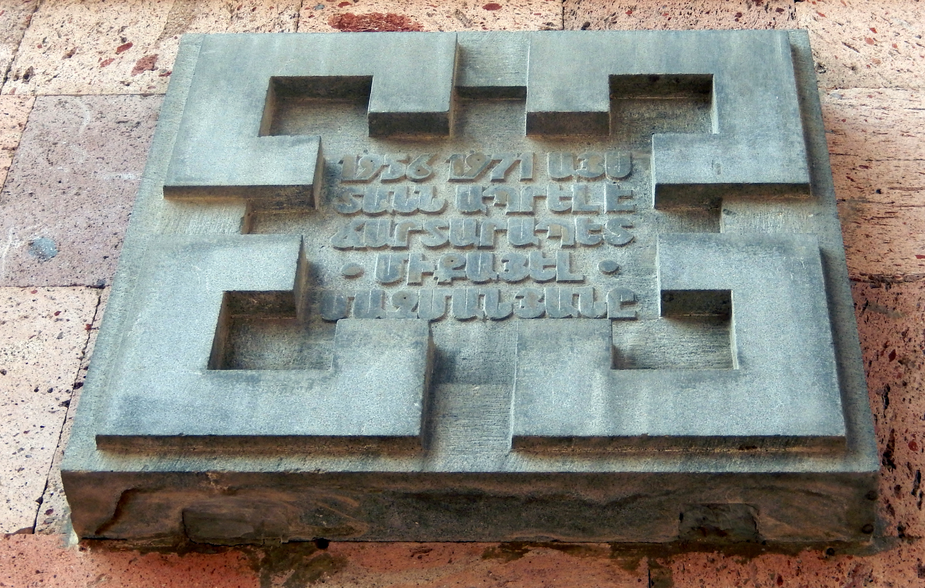 Հուշատախտակ` ճարտարապետ Միքայել Մազմանյանի